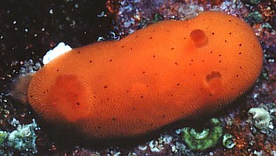 Rostanga elandsia